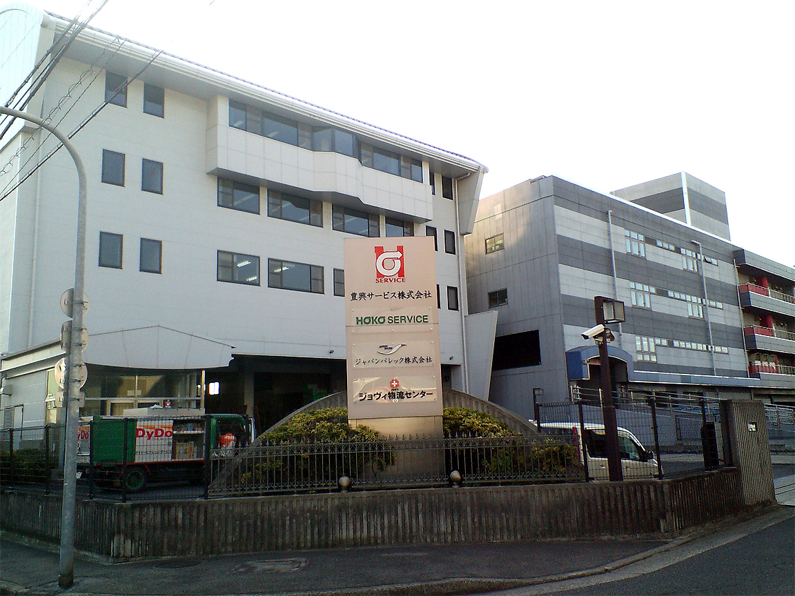 投稿者自身が『豊興サービス株式会社 本社ビル』 （大阪府泉北郡忠岡町忠岡中3-1551-1）を撮影。